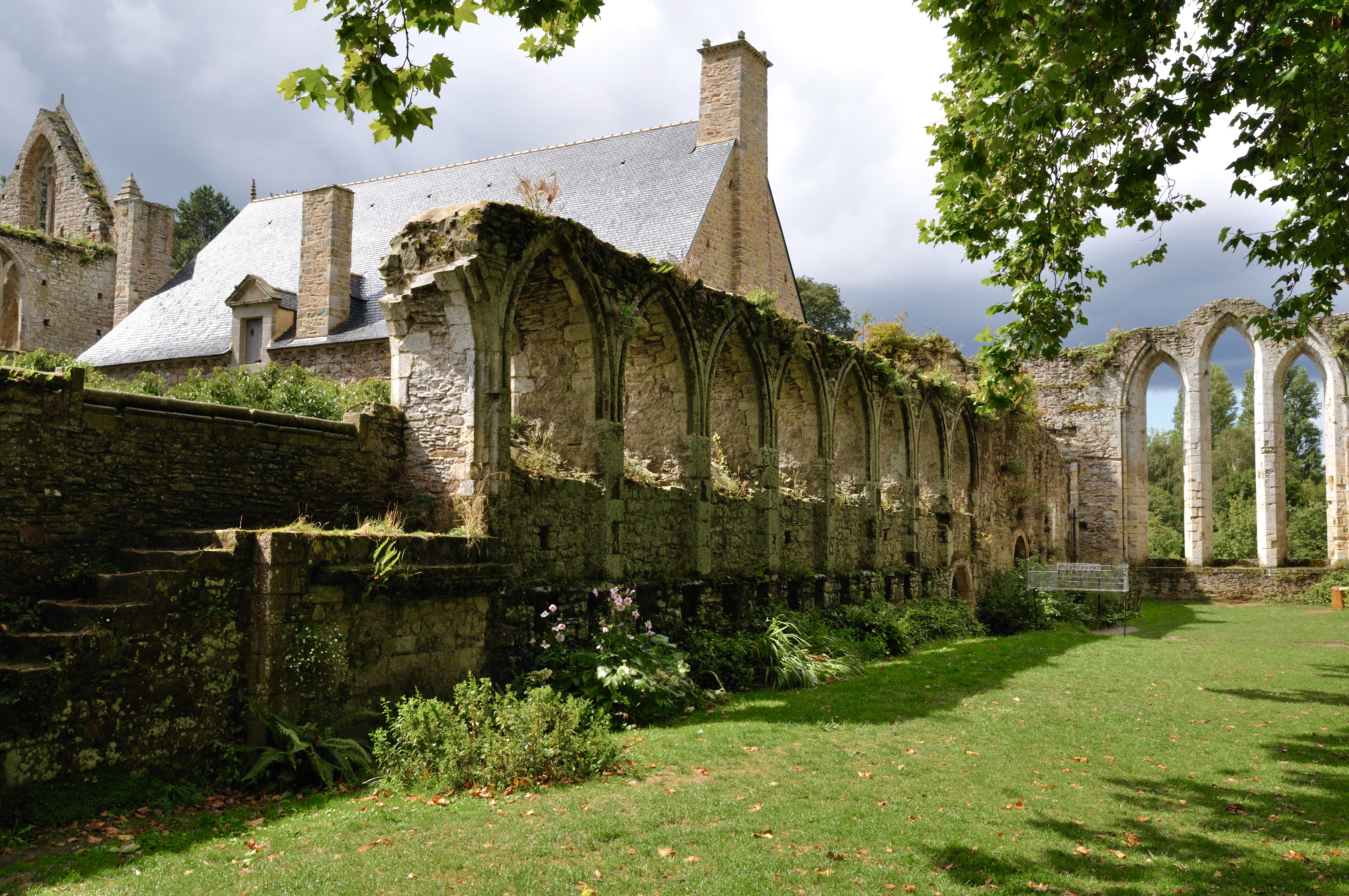 Abbaye de Beauport, aile ouest